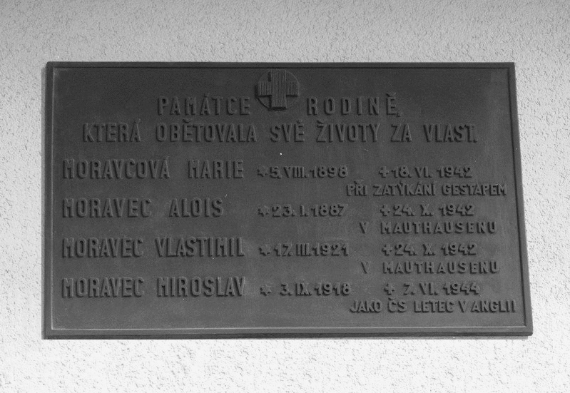 Na domě, kde bydlela za okupace rodina Moravcových, (Biskupcova 1745/7, Praha 3-Žižkov) je umístěna pamětní deska s následujícím textem: PAMÁTCE RODINĚ,/ KTERÁ OBĚTOVALA SVÉ ŽIVOTY ZA VLAST./ MORAVCOVÁ MARIE * 5.VIII.1898 + 18.VI.1942 PŘI ZATÝKÁNÍ GESTAPEM / MORAVEC ALOIS * 23.I.1887 + 24.X.1942 V MAUTHAUSENU / MORAVEC VLASTIMIL * 17.III.1921 + 24.X.1942 V MAUTHAUSENU / MORAVEC MIROSLAV * 3.IX.1918 + 7.VI.1944 JAKO ČS. LETEC V ANGLII. Biskupcova 1745/7; 130 00 Praha 3 – Žižkov, okres Hlavní město Praha, kraj Hlavní město Praha, Česko